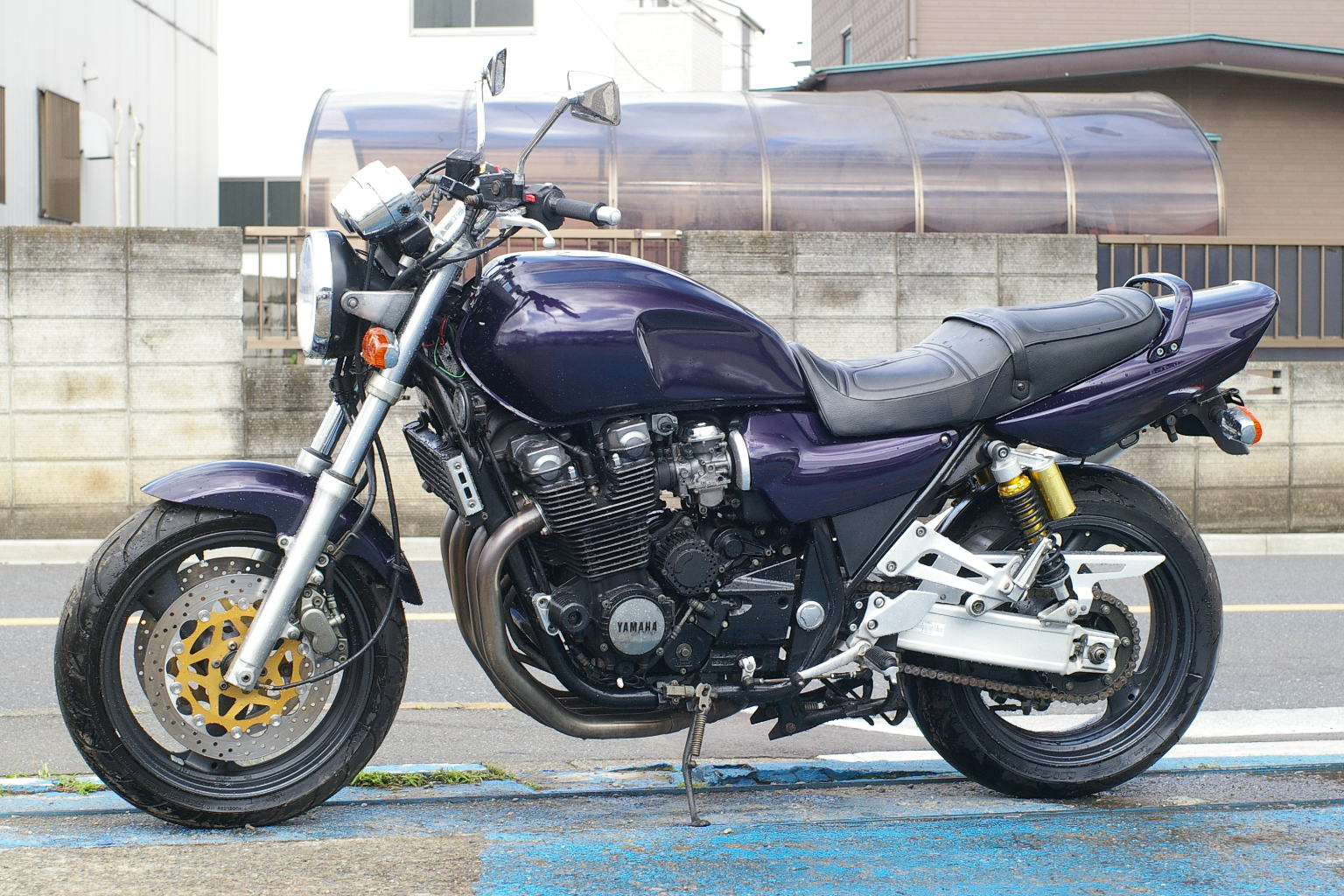 XJR1200